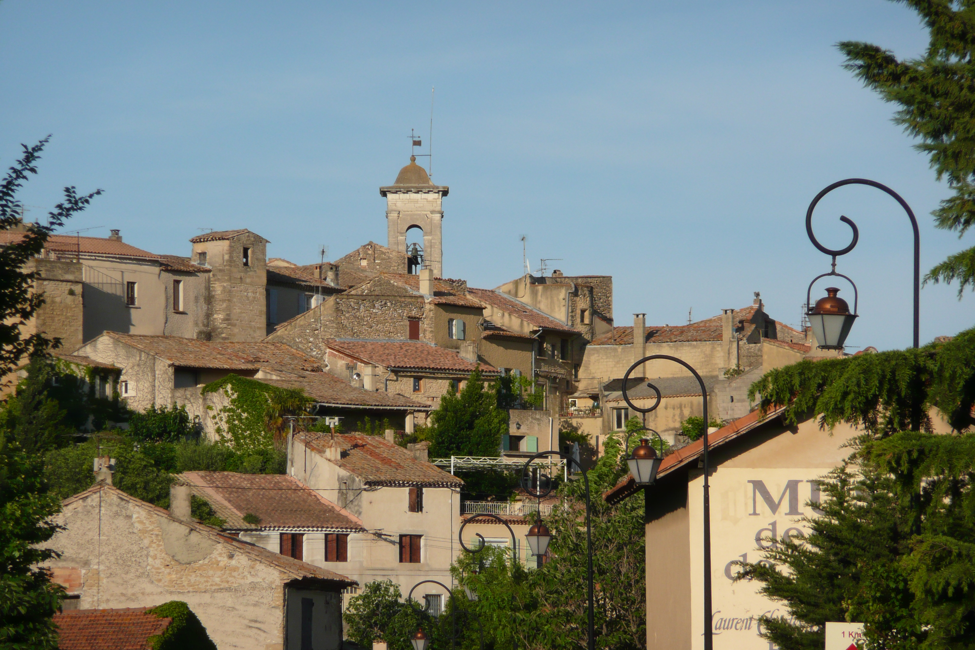 Vue d'ensemble du vieux village Châteauneuf-du-Pape.